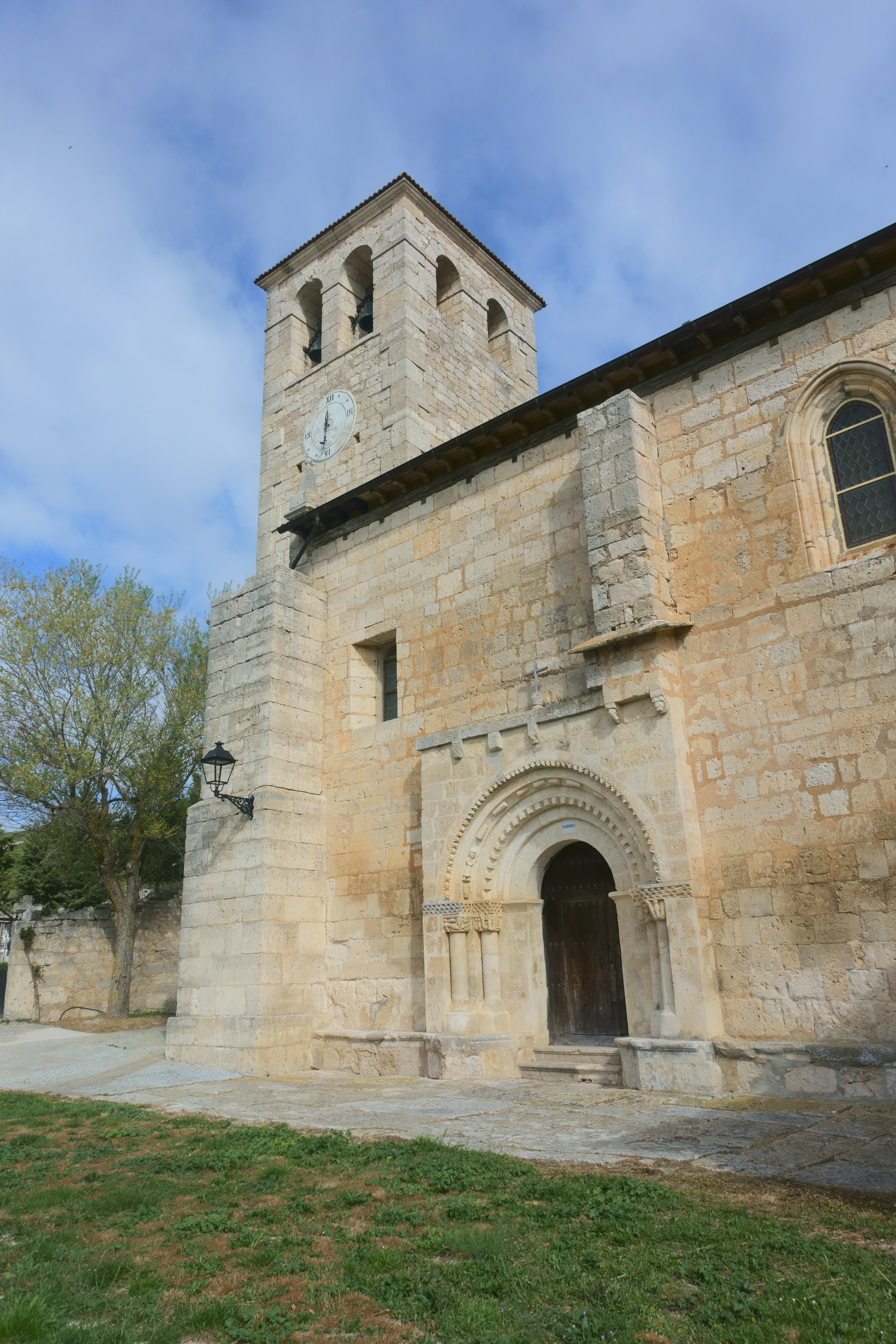 Iglesia de San Vicente, Susinos del Páramo (Burgos, España).